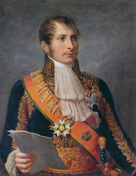 Portrait du prince Eugène de Beauharnais (1781-1824), vice-roi d'Italie et duc de Leuchtenberg